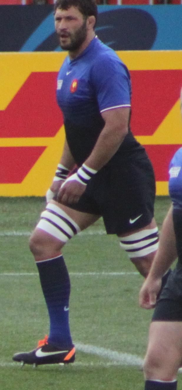 Lionel Nallet pendant la RWC 2011